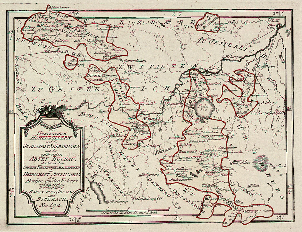 Das Fürstenthum Hohenzollern und die Grafschaft Sigmaringen mit der gefürsteten Abtey Buchau, der Deutschen Ordens-Komthurey Alschhausen, der Herrschaft Justingen, den Abteÿen um den Federsee und den freÿen Reichsstädten Ravensburg, Buchau und Biberach. Nro. 194. Kolorierter Kupferstich